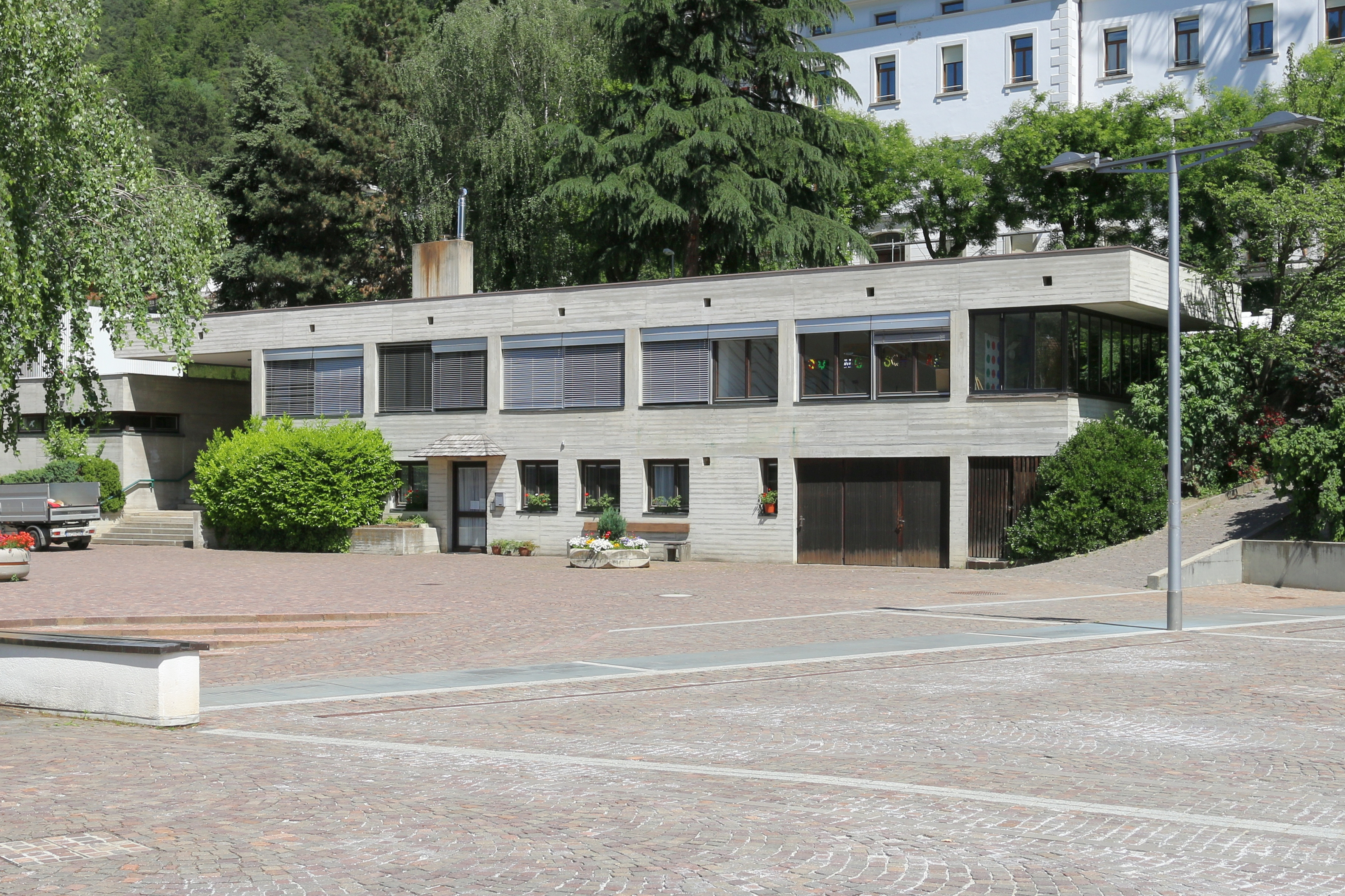 Brixen-Milland, Südtirol: Dorfplatz und Pfarrheim